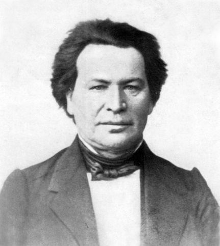 Portrait von Aloys Pollender